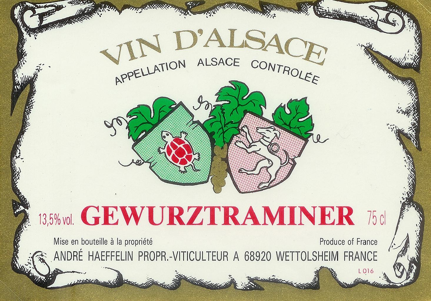 Etiquette vin 1 Haeffelin.